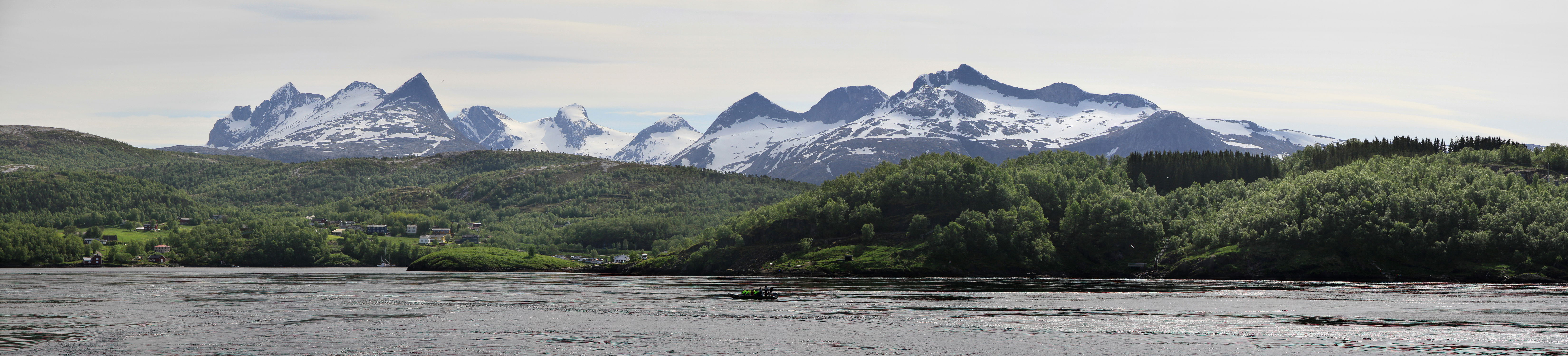 Børvasstindan mountains as seen over Saltstraumen in 2011 June.